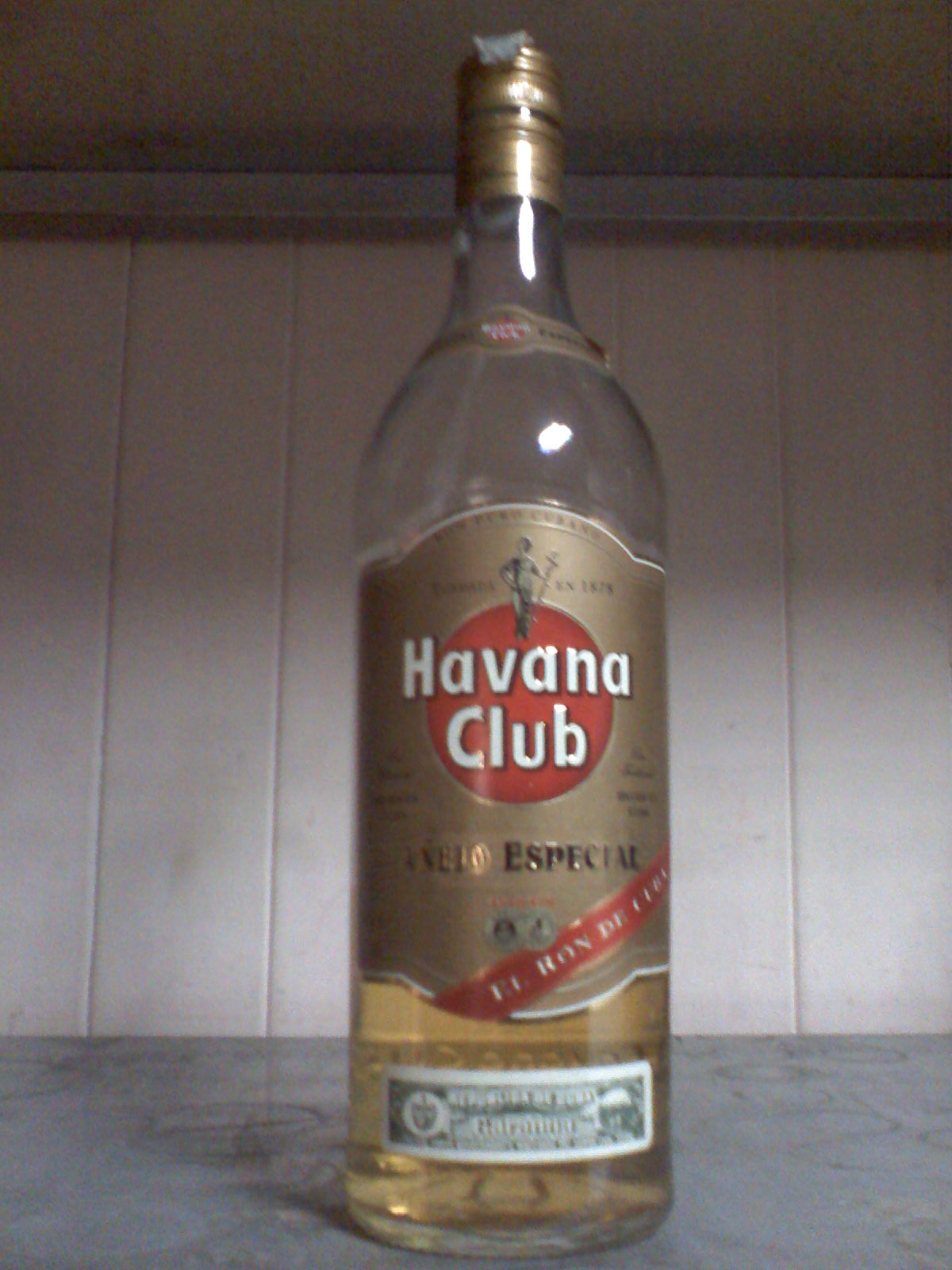 In un bar di Roma.